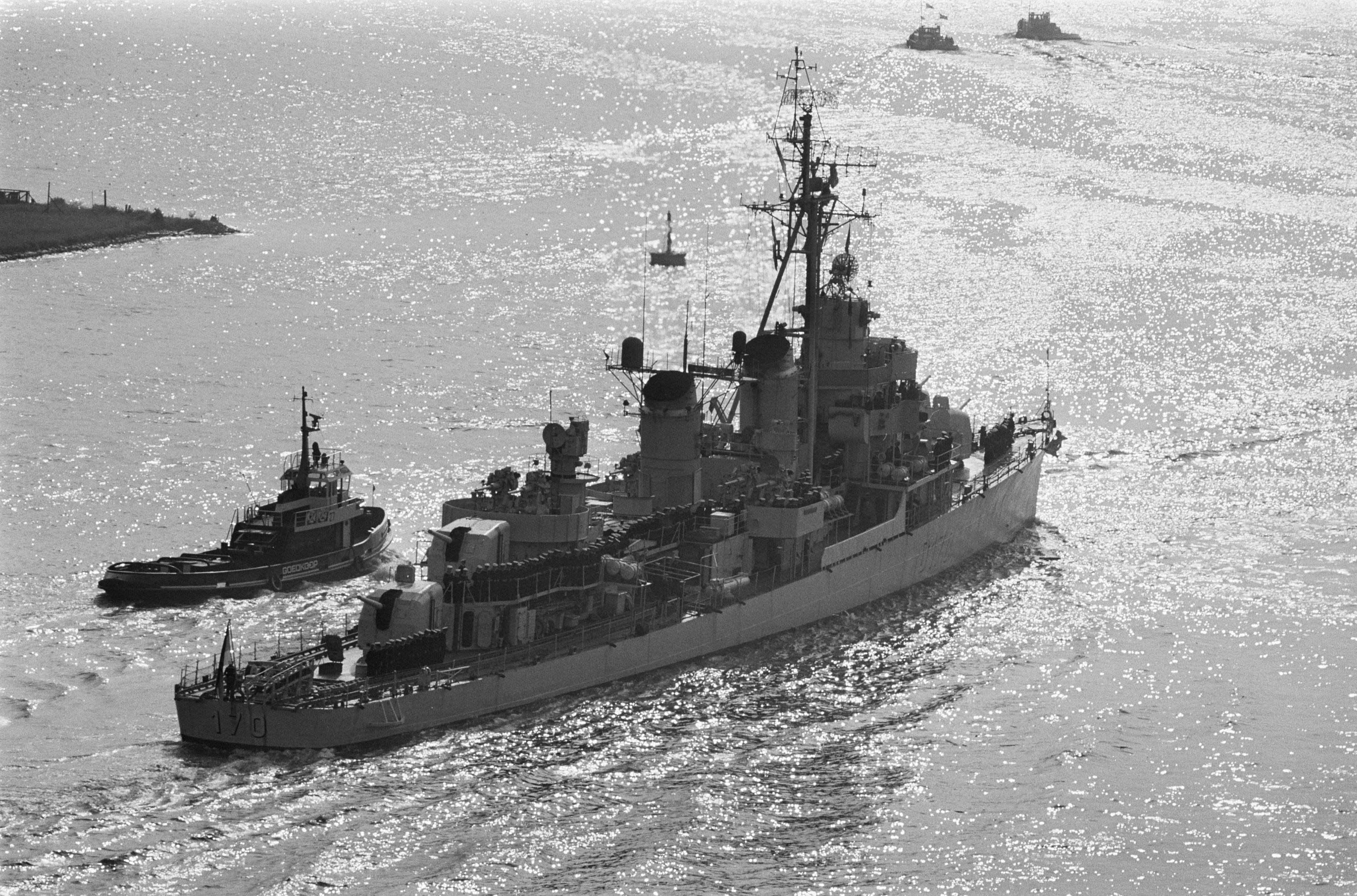 Collectie / Archief : Fotocollectie Anefo Reportage / Serie : [ onbekend ] Beschrijving : Drie West-Duitse torpedojagers in Amsterdam: binnenvaren Datum : 18 augustus 1969 Locatie : Amsterdam, Noord-Holland Trefwoorden : TORPEDOJAGERS Fotograaf : Evers, Joost / Anefo Auteursrechthebbende : Nationaal Archief Materiaalsoort : Negatief (zwart/wit) Nummer archiefinventaris : bekijk toegang 2.24.01.05 Bestanddeelnummer : 922-7159